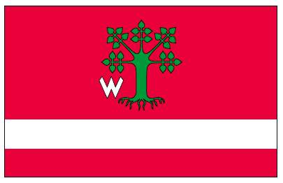 Flaga gminy Lipie • Flag of gmina Lipie